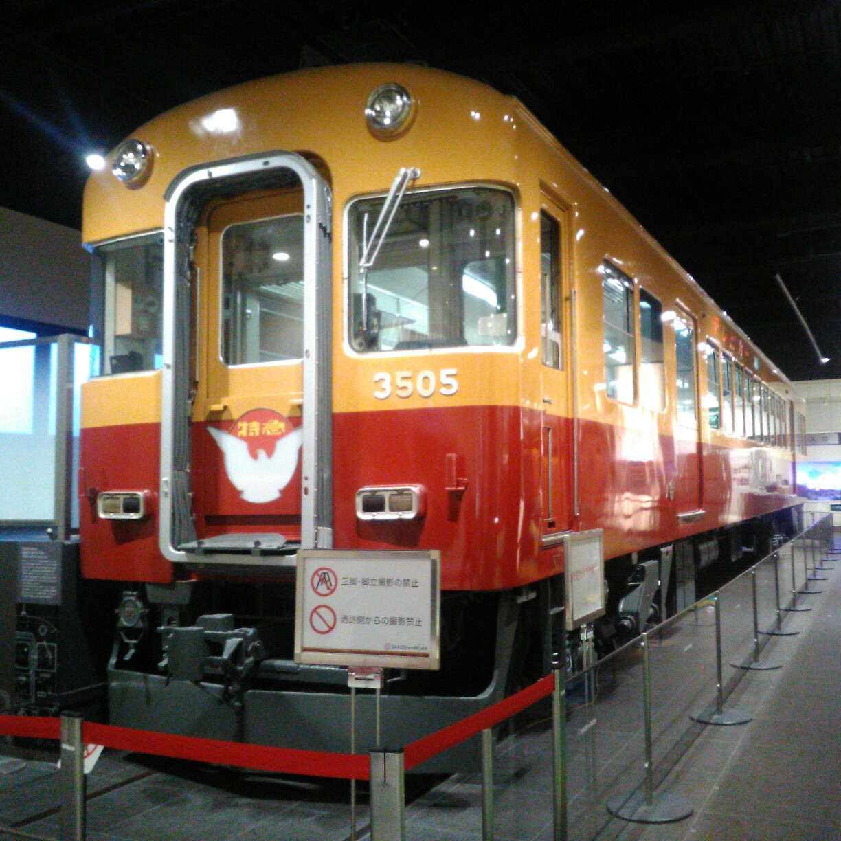 くずはモールにデジタル動態保存されている京阪旧3000系。